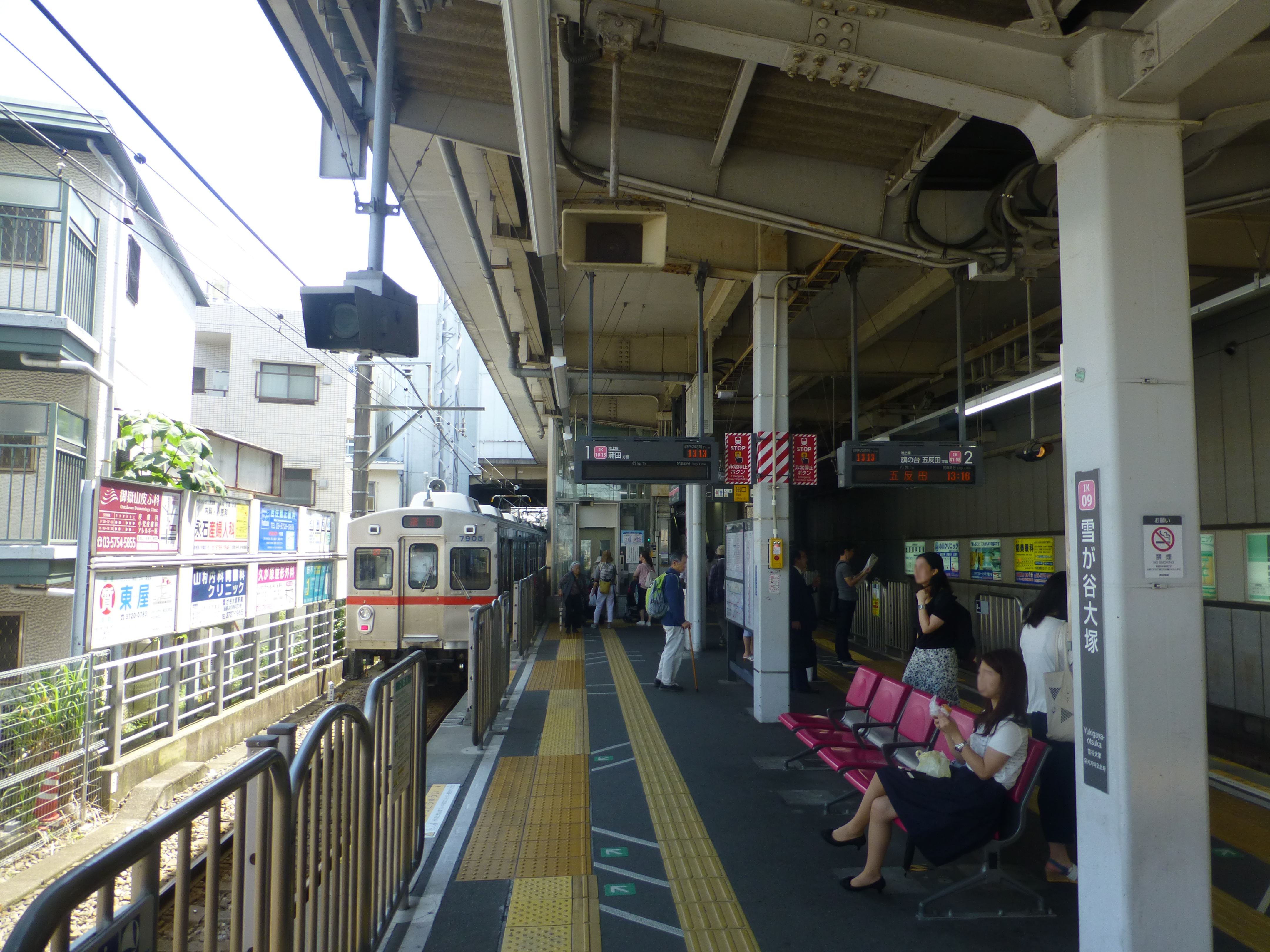 Yukigaya-Ōtsuka Station platform (雪が谷大塚駅のホーム)